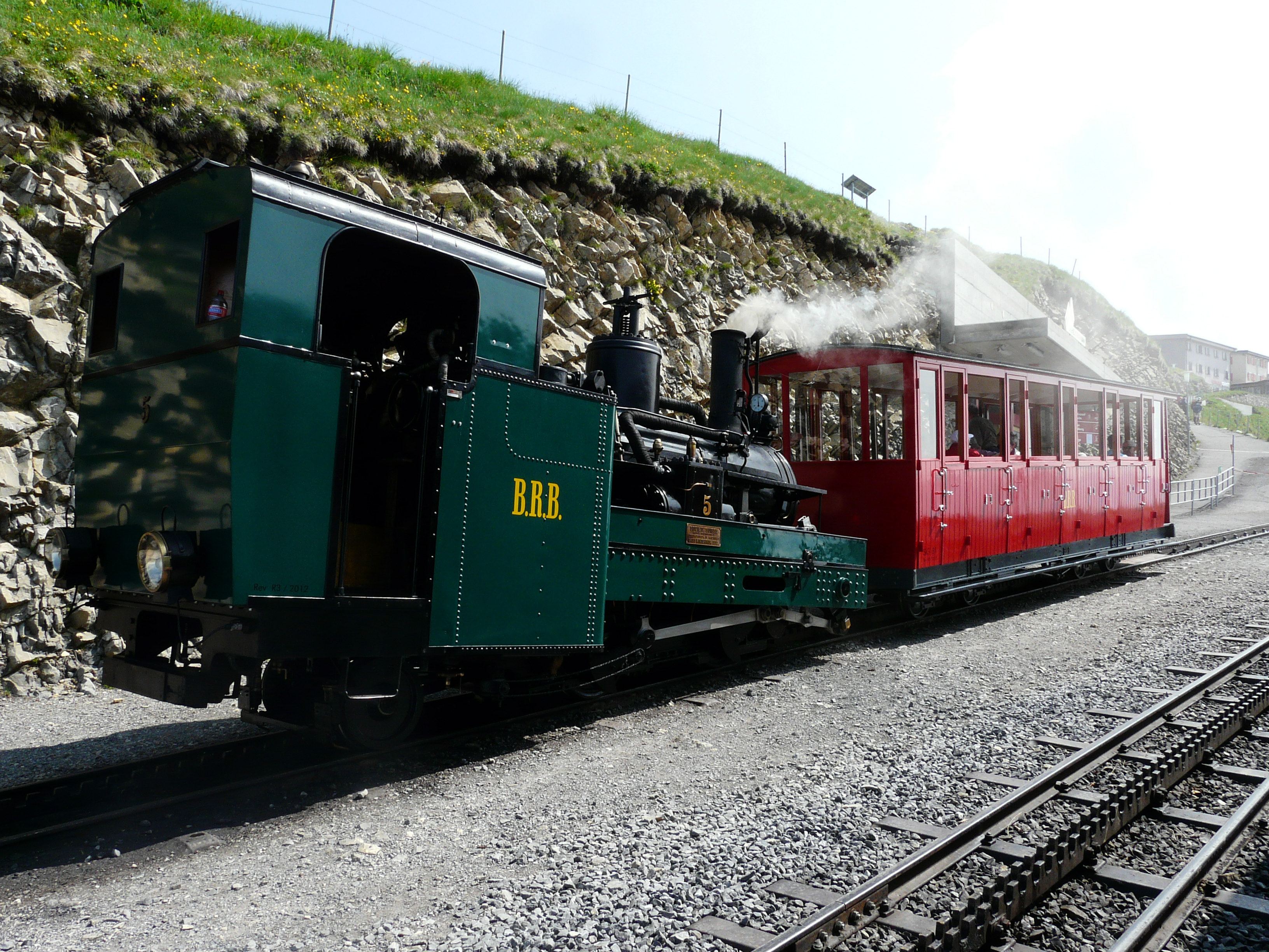 Dampfzug in der Bergstation der Brienzer Rothornbahn